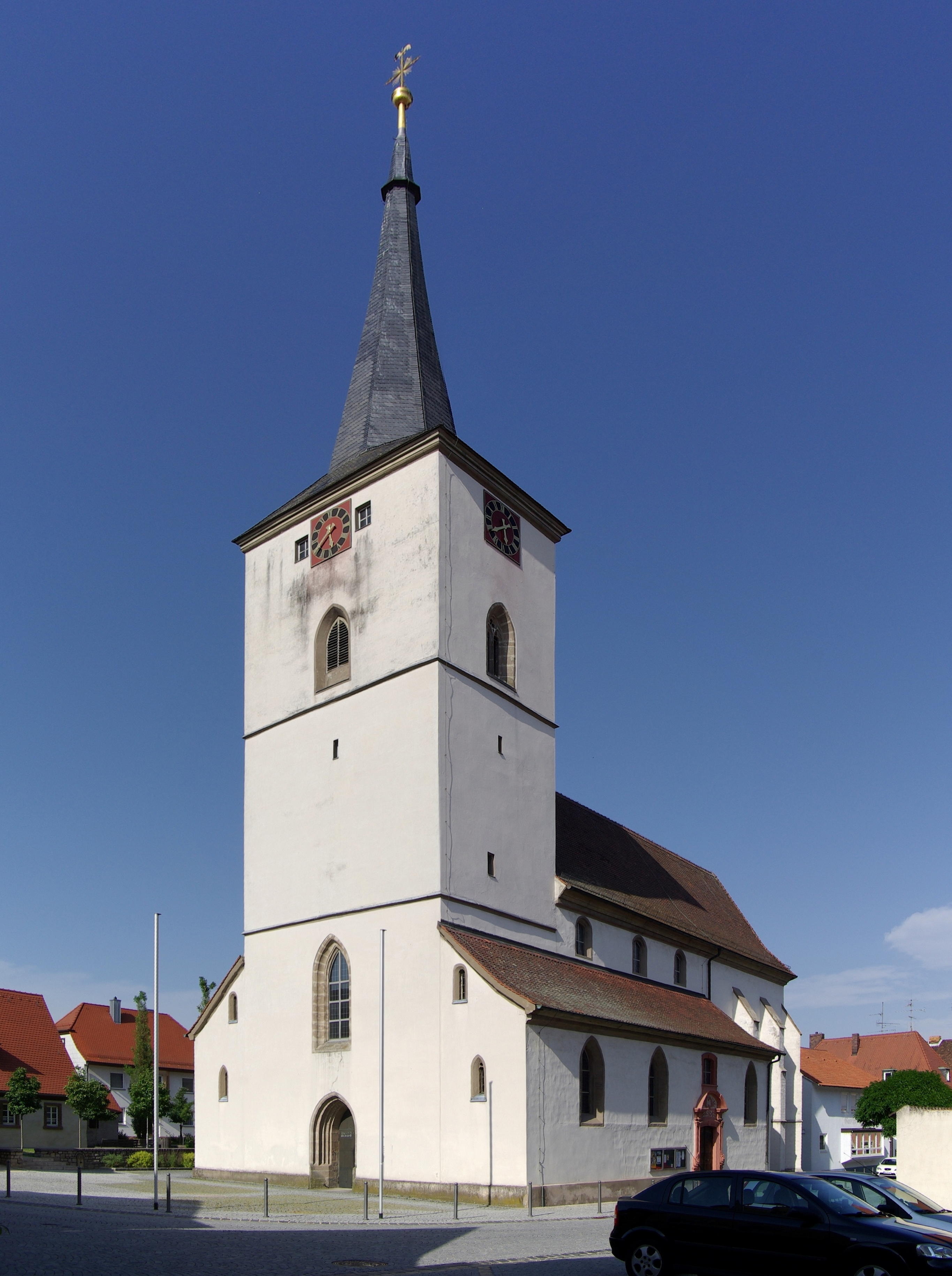 Bayern, Oberfranken, Schlüsselfeld, Pfarrkirche St. Johannes d. T.